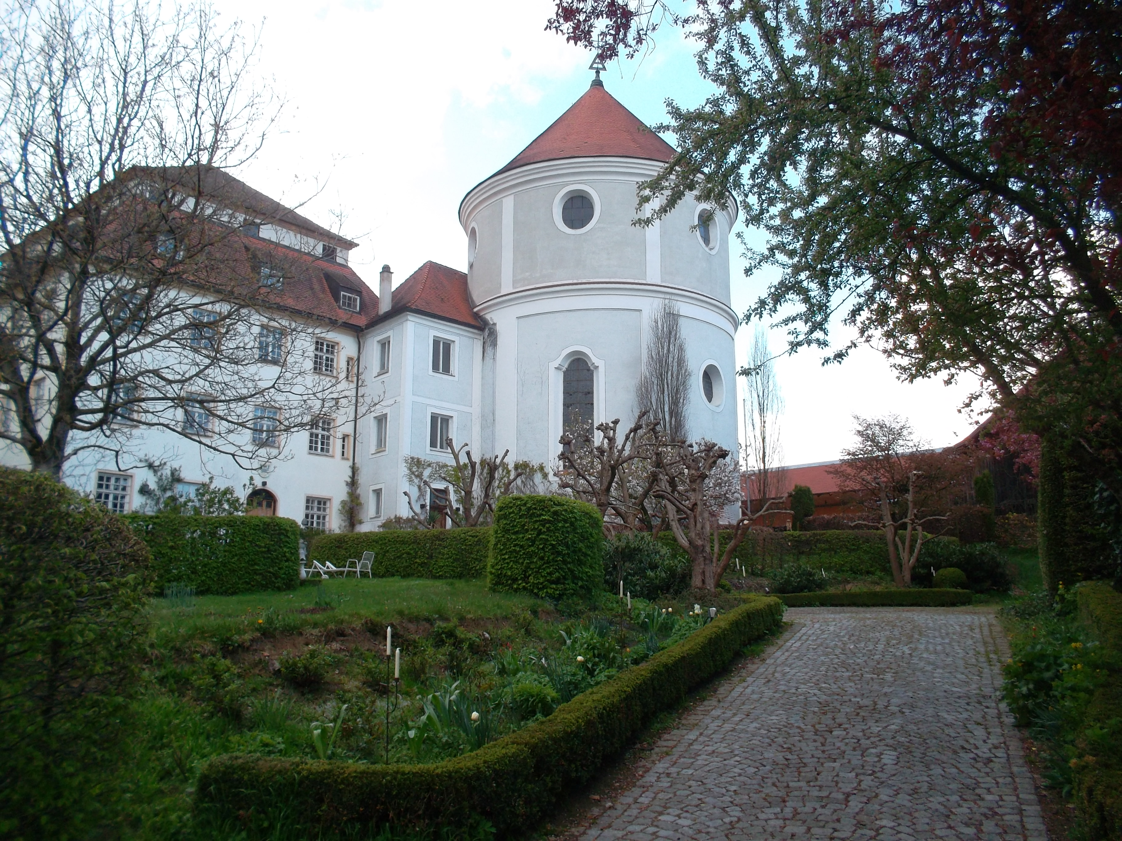 Außenansicht von Schloss Kalling bei Dorfen (Obb)